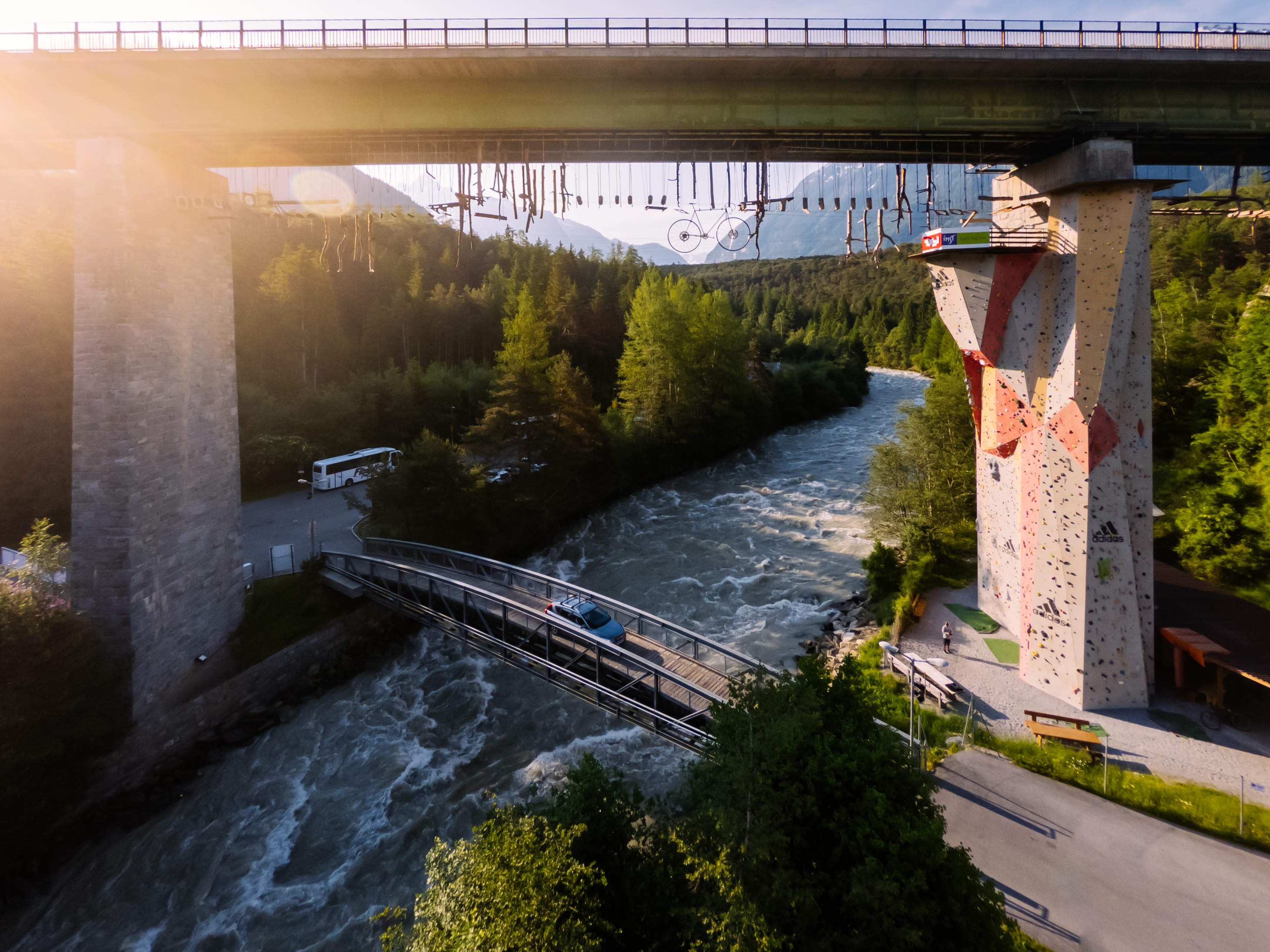 Hochseilgarten auf 27 Meter unter einer befahrenen Brücke